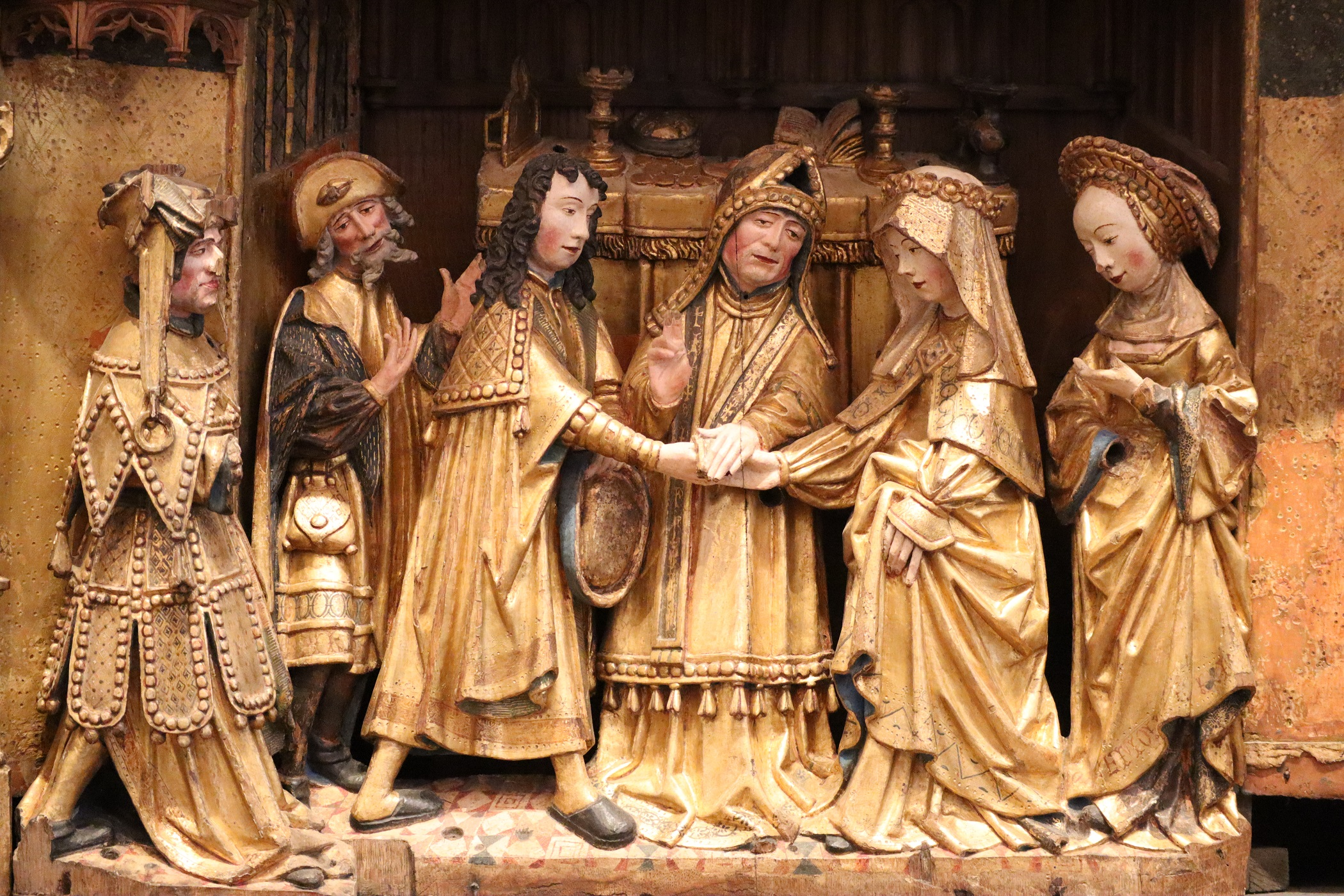 Retable anversois de la cathédrale métropolitaine Saint-Pierre de Rennes. Prédelle. Le mariage d'Anne et Joachim.